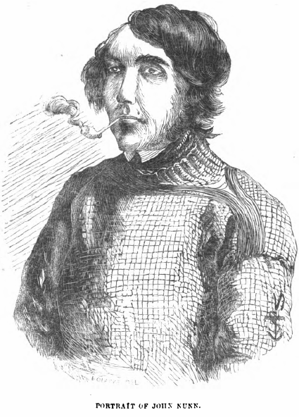 Portrait von John Nunn ca. 1850